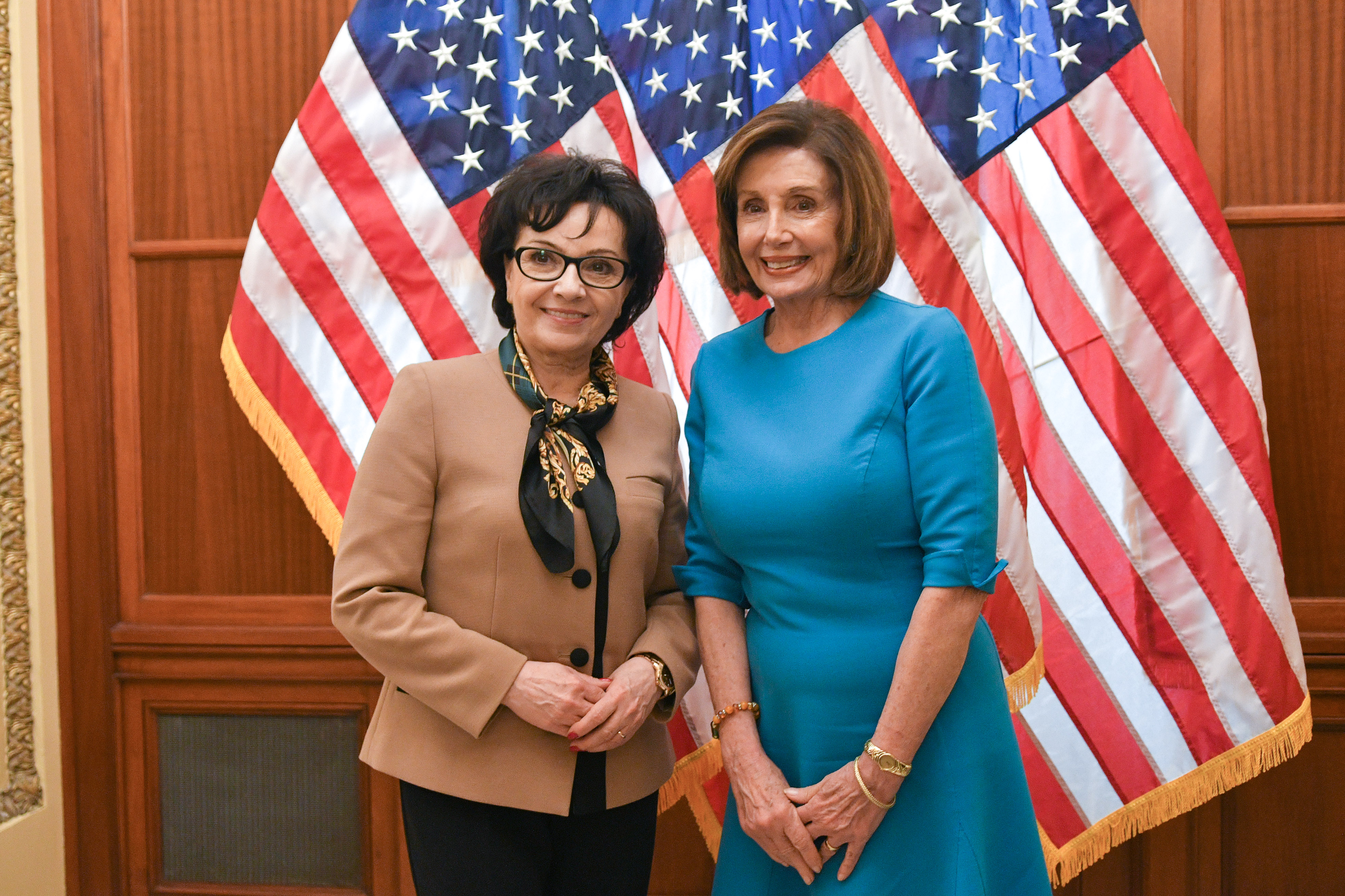 fot. Kancelaria Sejmu/Łukasz Błasikiewicz